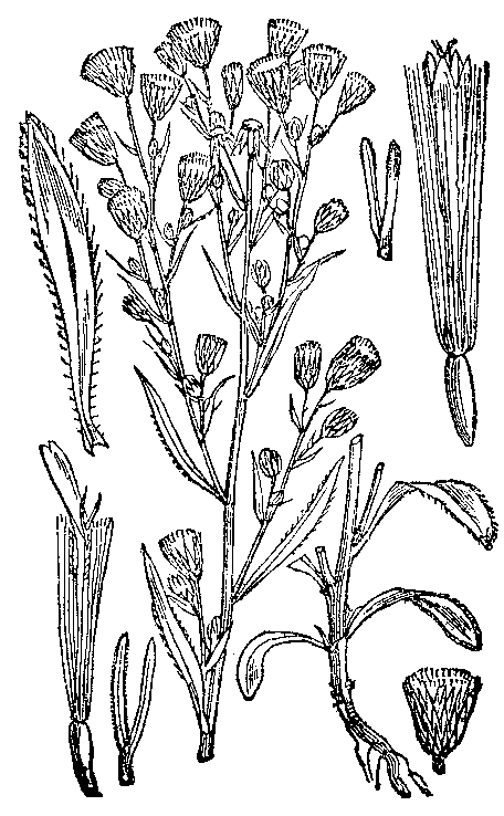 Slika 252. Kanaški úročnik. (Erígeron canadénse.) [sic!]